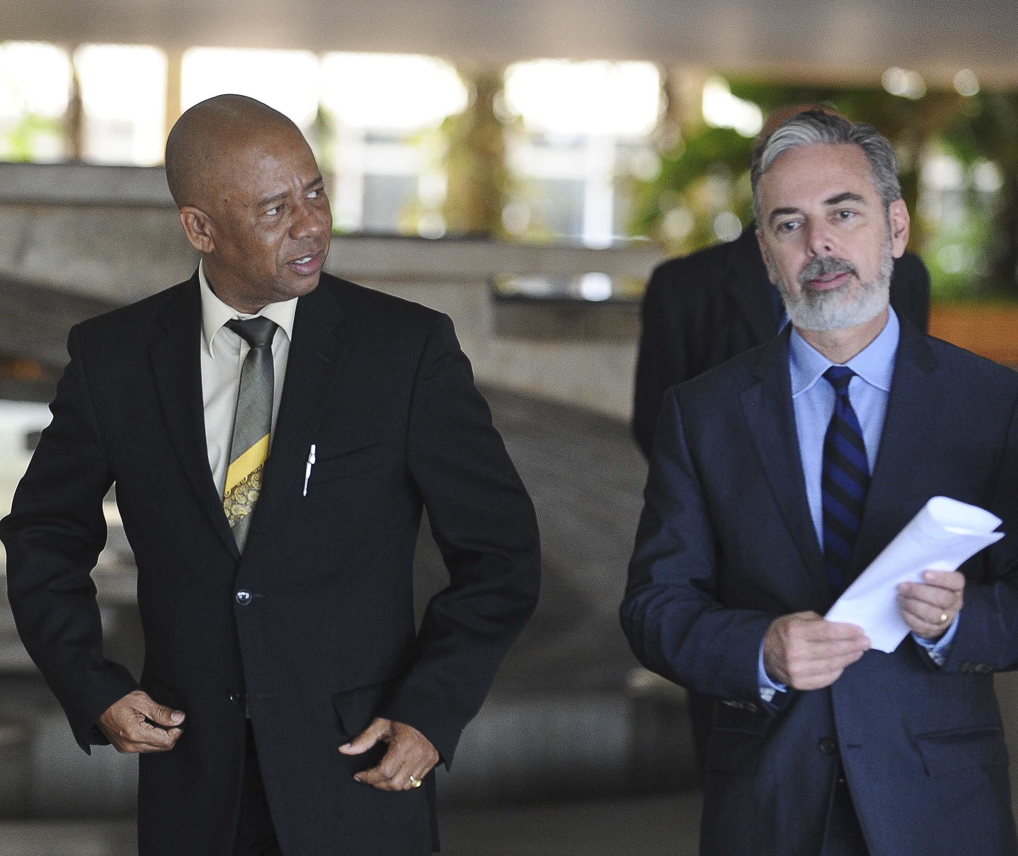 Brasília - Os ministros das Relações Exteriores do Suriname e do Brasi, Winston Lackin e Antônio Patriota, dão entrevista sobre os acordos de cooperação entre os dois países.